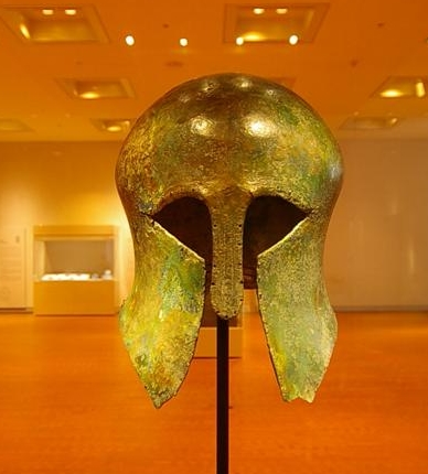 손기정 투구 보물 제 904호 (지정년월일 : 1987년 3월 7일) 시대 : 기원전 7~8세기 / 1875년 발굴 국립중앙박물관 소장 '손기정 투구'로 알려진 이 투구는 그리스 아테네 브라드니 신문사가 베를린 올림픽 당시 마라톤 우승자에게 씌워 주려 했으나 전달되지 못하고 50년간 베를린의 샤로텐부르크 박물관에 보관되어 오다가 지난 1986년 손기정 옹에게 전달되었다. 손기정 옹은 이를 지난 1994년 국가에 기증했으며 정부는 서양유물로는 처음으로 보물 904호로 지정했다.